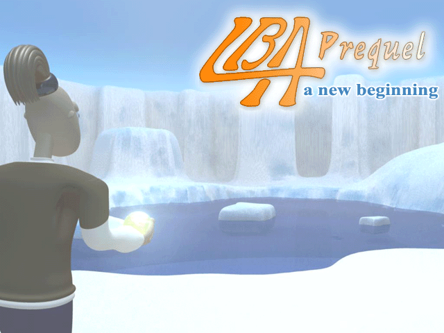 Capture d'écran de LBA Prequel, une mod du jeu vidéo Little Big Adventure (1994). La mod a été mise à disposition du public en décembre 2012 par des membres du MagicBall Network.